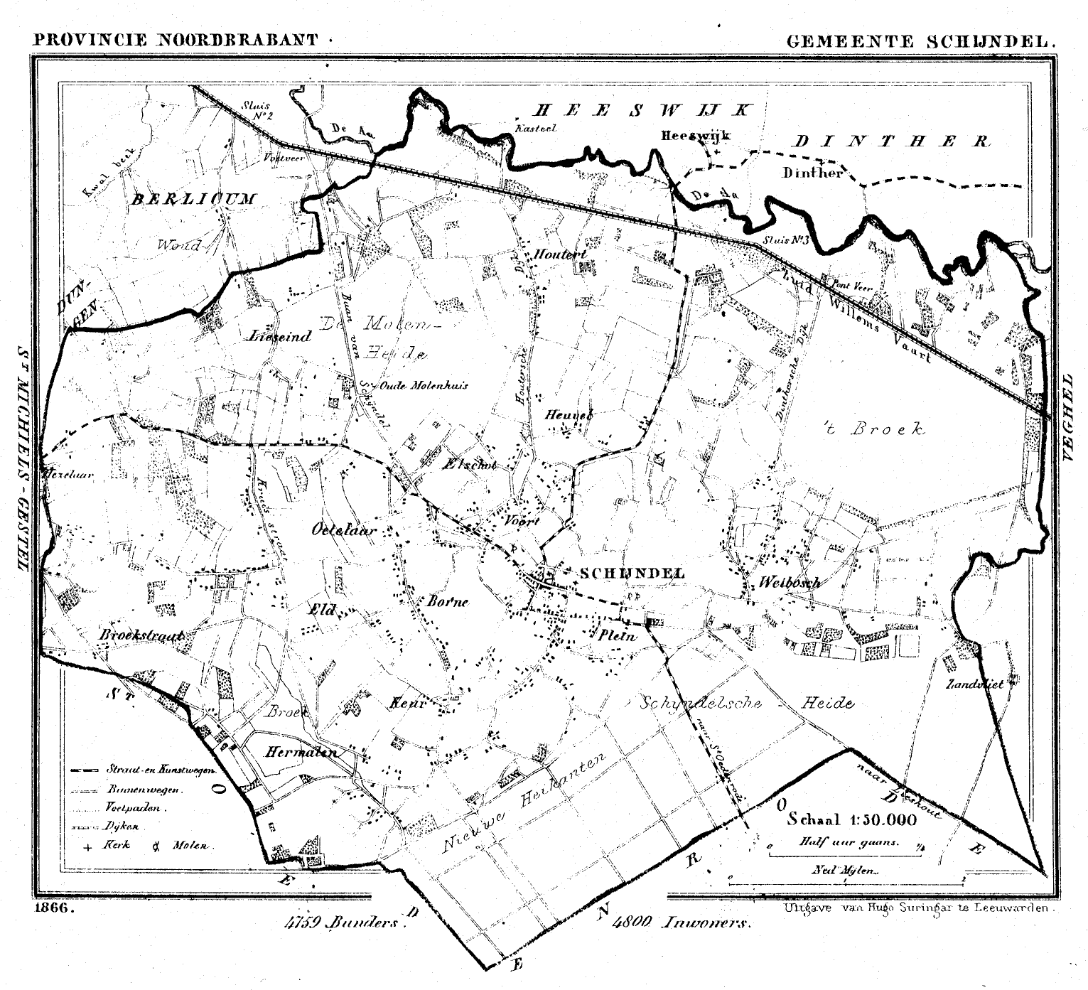 Nederland, Noord-Brabant, Gemeente Schijndel